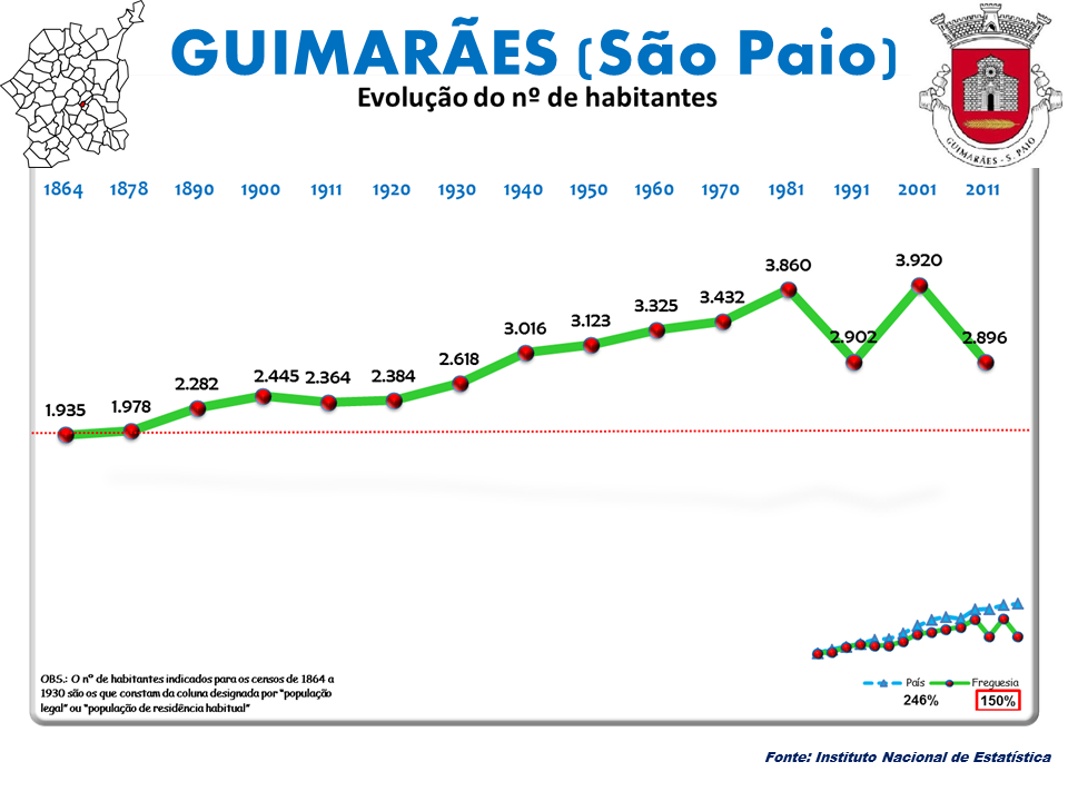 Evolução da População 1864 / 2011